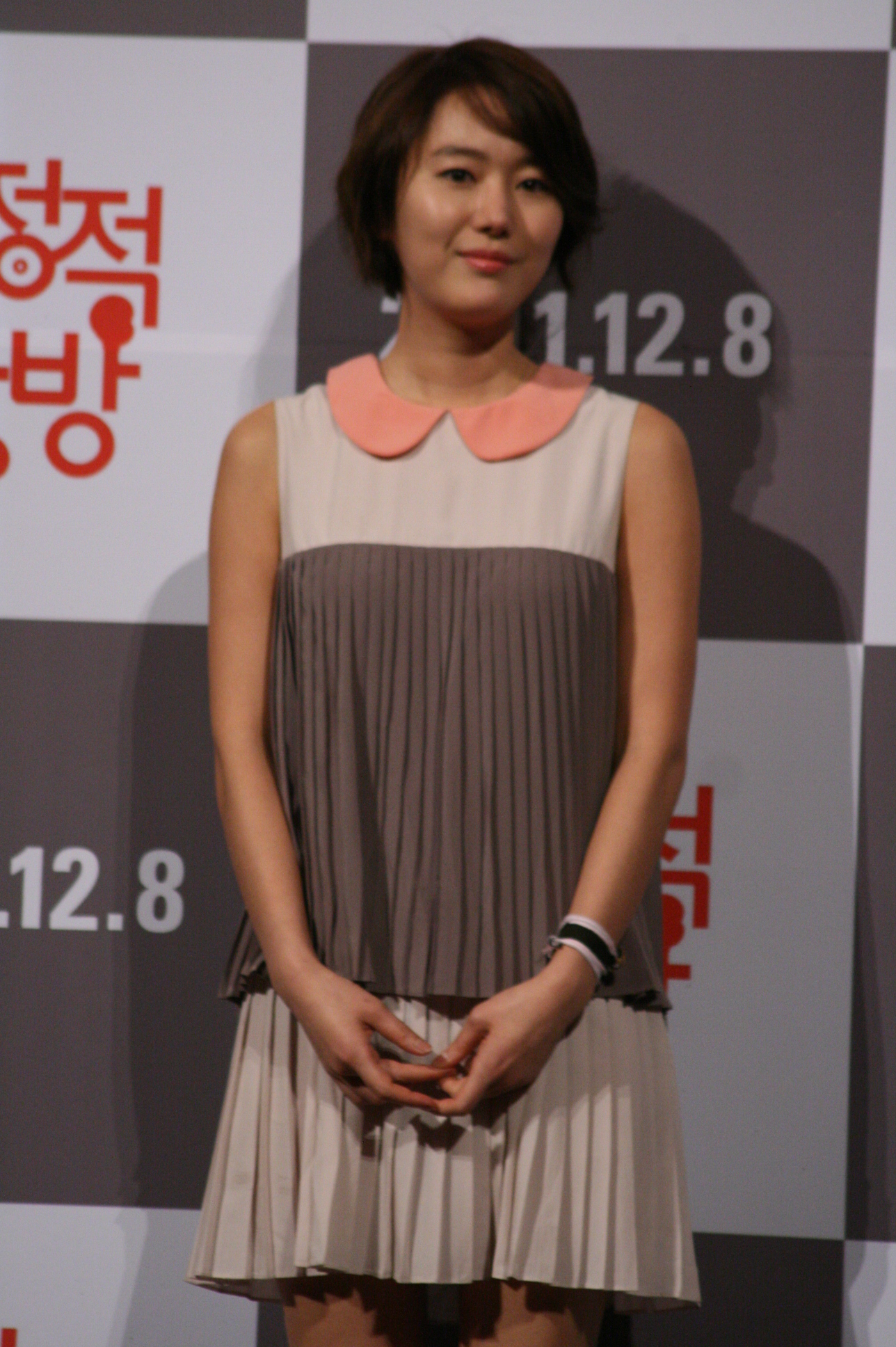 2011년 12월 1일 서울 왕십리 CGV에서 열린 영화 《결정적 한방》 언론시사회 및 기자간담회에 참석한 윤진서.